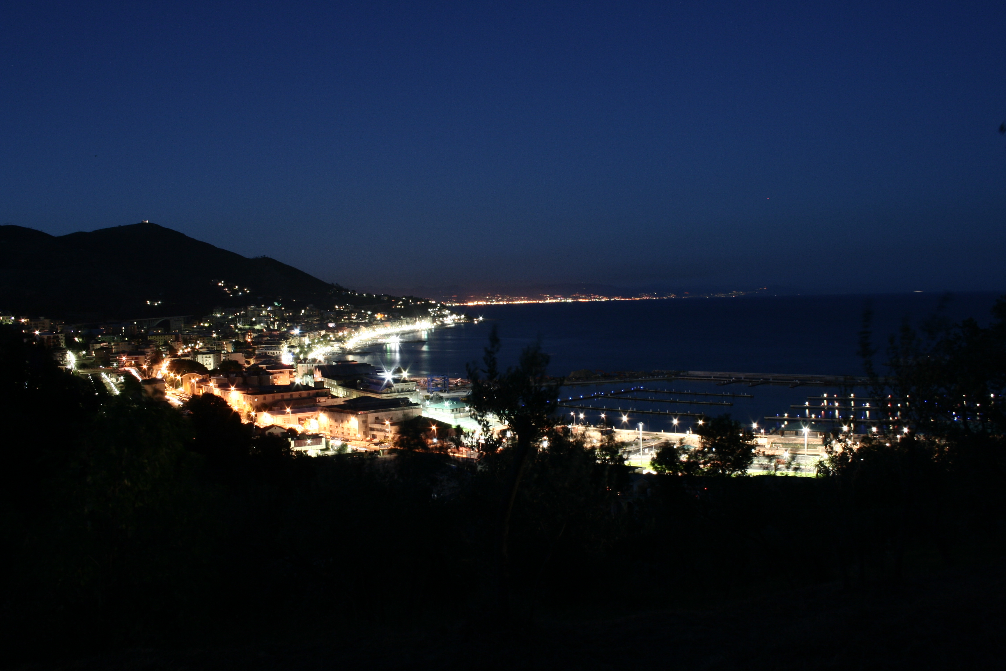 Varazze, provincia di Savona.Vista notturna da Ovest. Si posso distinguere il nuovo porto (sulla destra) ancora in costruzione, i cantieri Baglietto (a fianco del porto nuovo) e in alto la chiesetta della Madonna dell Guardia. France74 - Estate2005